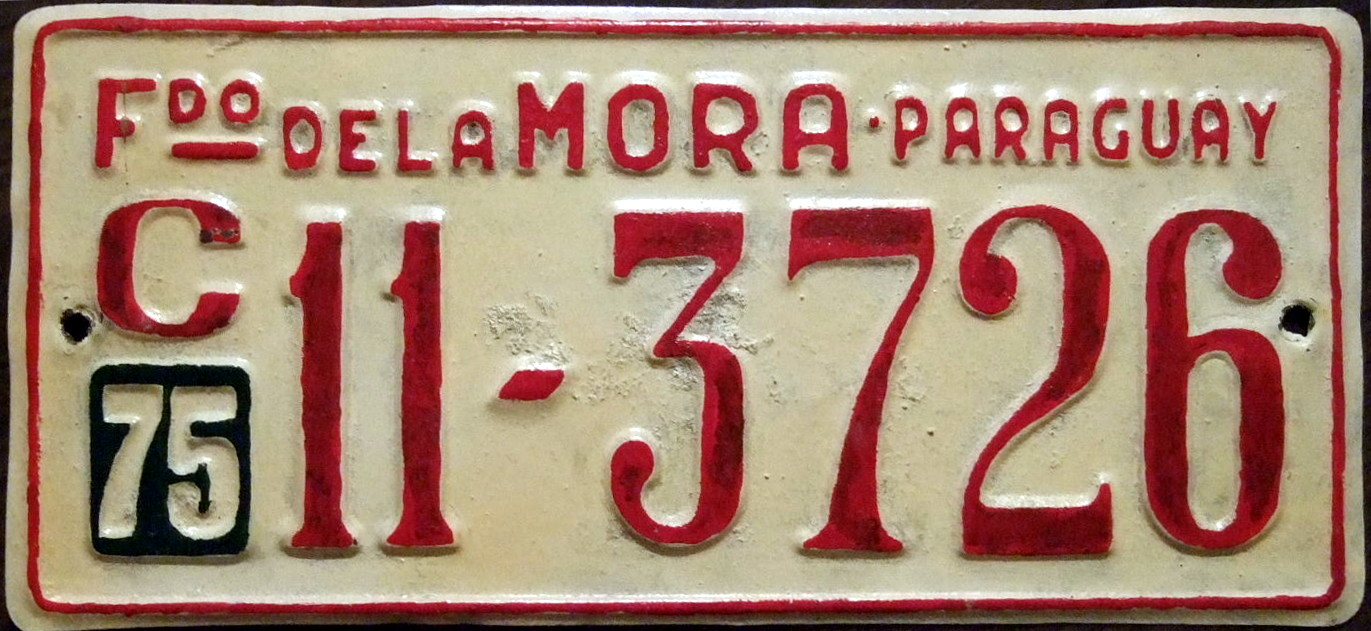 PARAGUAY 1975